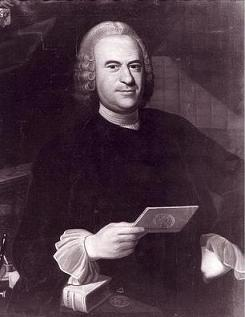 Gerard Barendszoon Kloek (1703-1760)